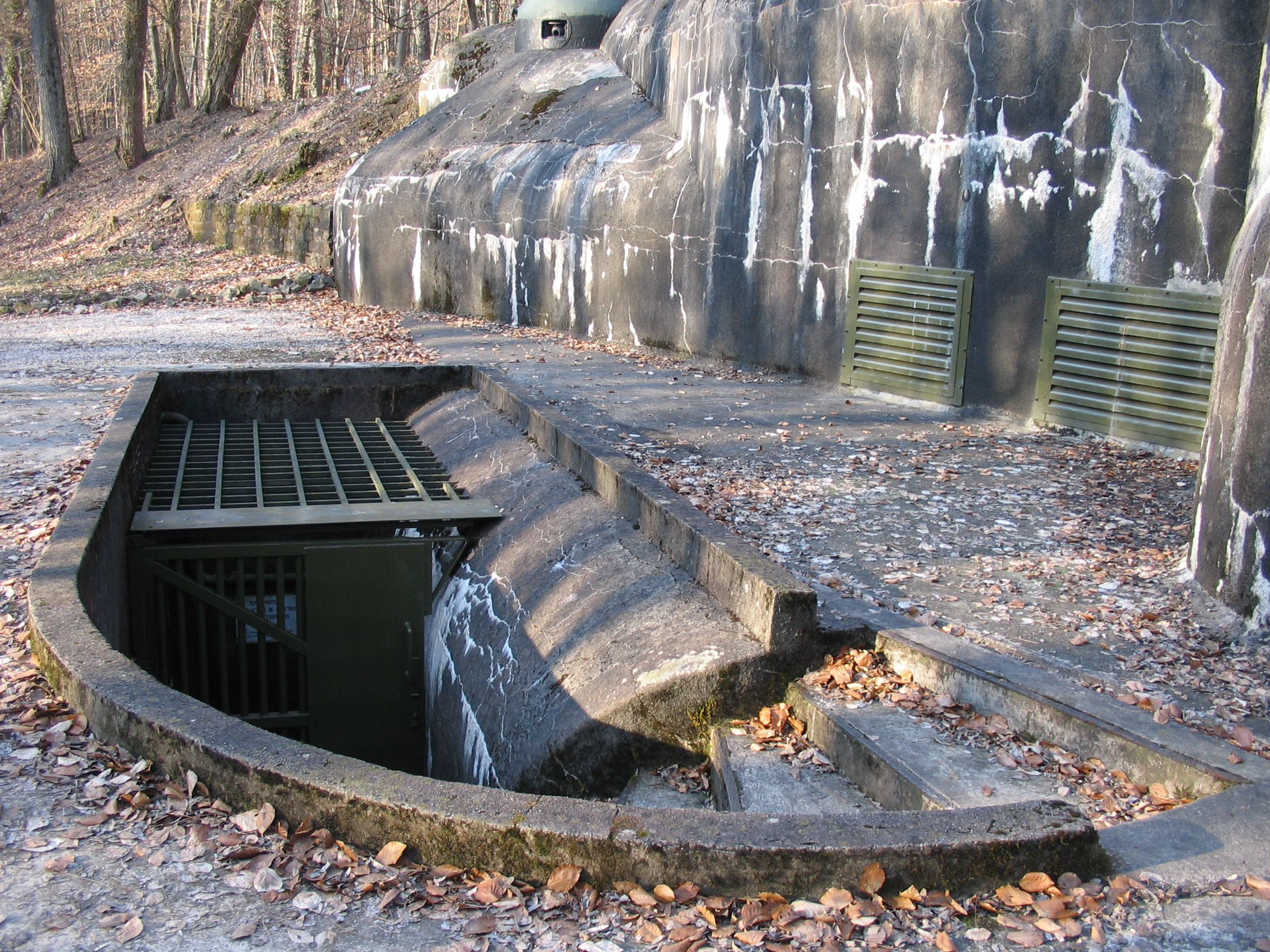 Fort de Schoenenbourg, élément de la ligne Maginot. Entrée des hommes (bloc 8).Détail Photo prise par Denis Helfer sous licence GFDL.